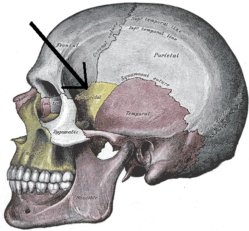 módosítva